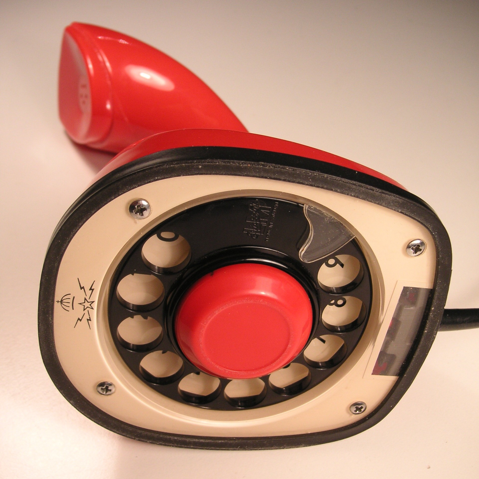 Ericssons telefon Ericofon "Kobra" undersidan